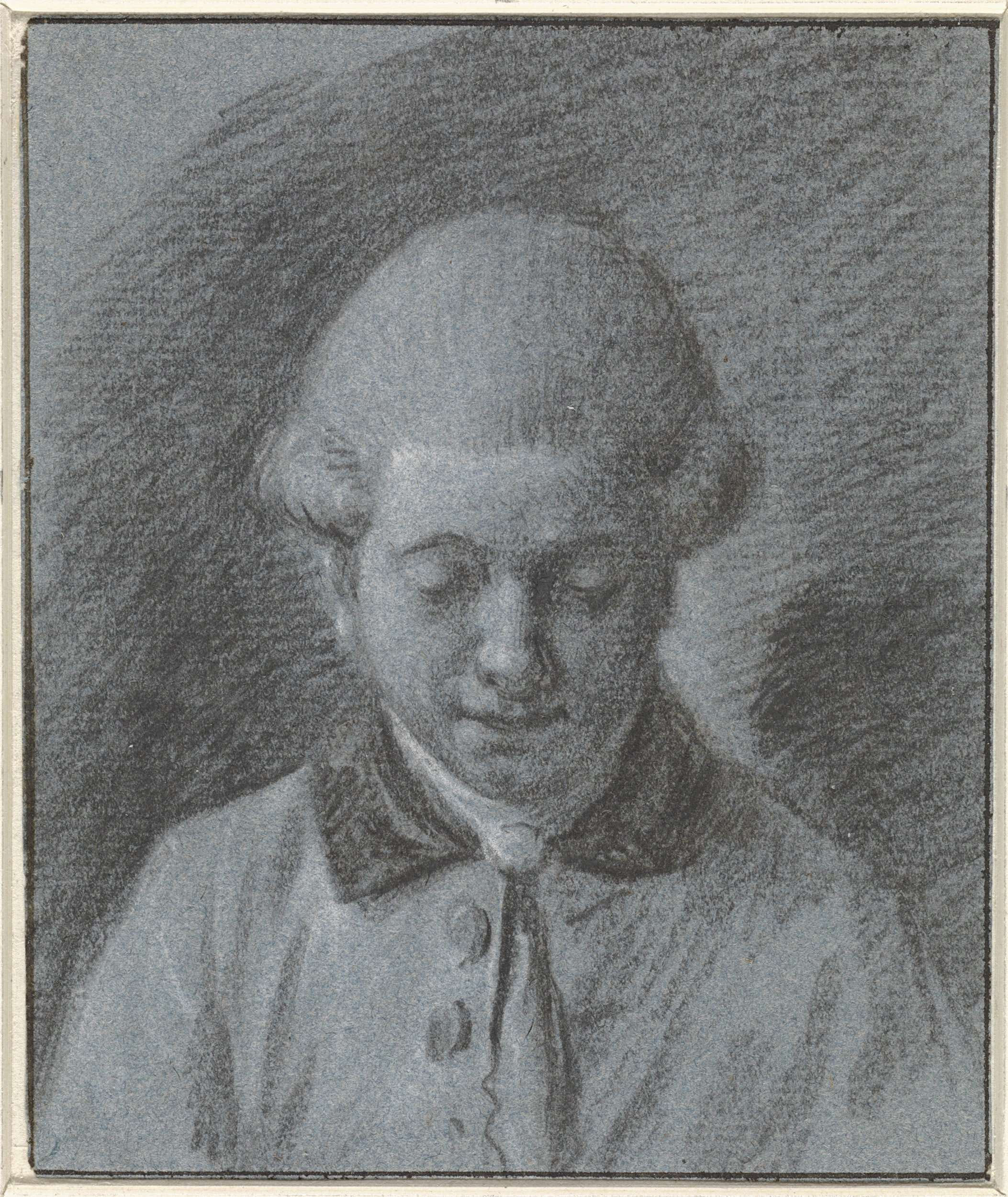 Portrait von Jean Grandjean (* 5. Februar 1752 in Amsterdam; † 12. November 1781 in Rom) holländischer Maler